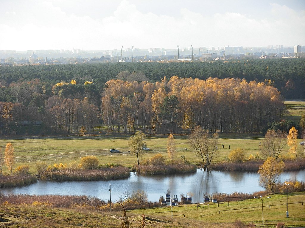 Widok z Góry Myślęcińskiej w Bydgoszczy